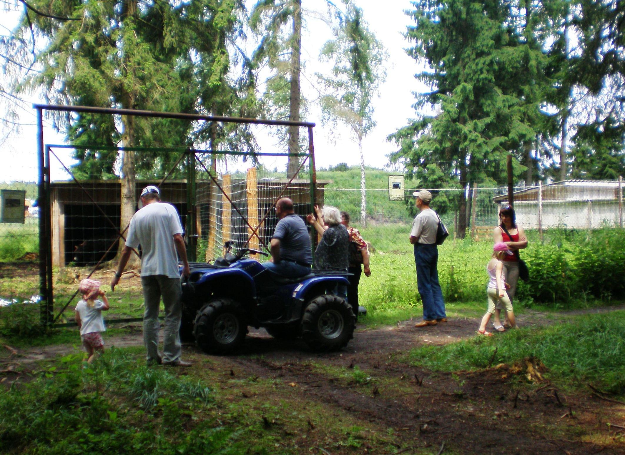 Viliumas Malinauskas Grūto parke